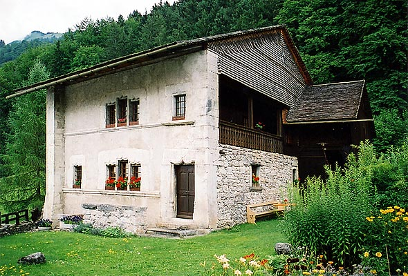 Grandvillard: Maison du Banneret (1659–1666)